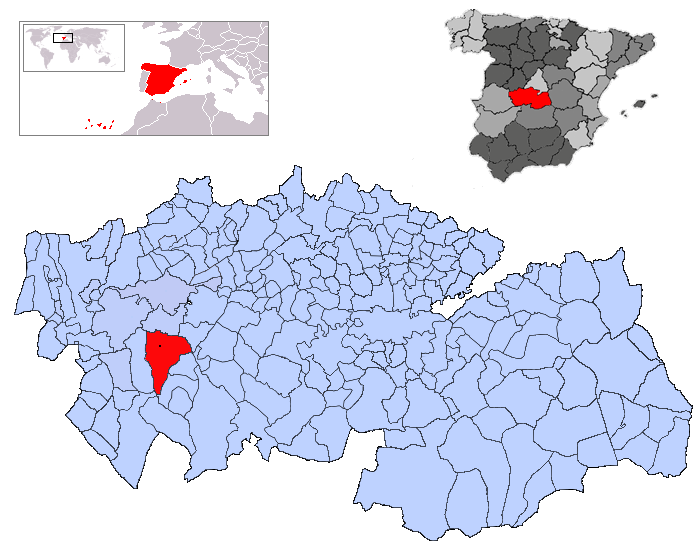 Alcaudete de la Jara en la provincia de Toledo